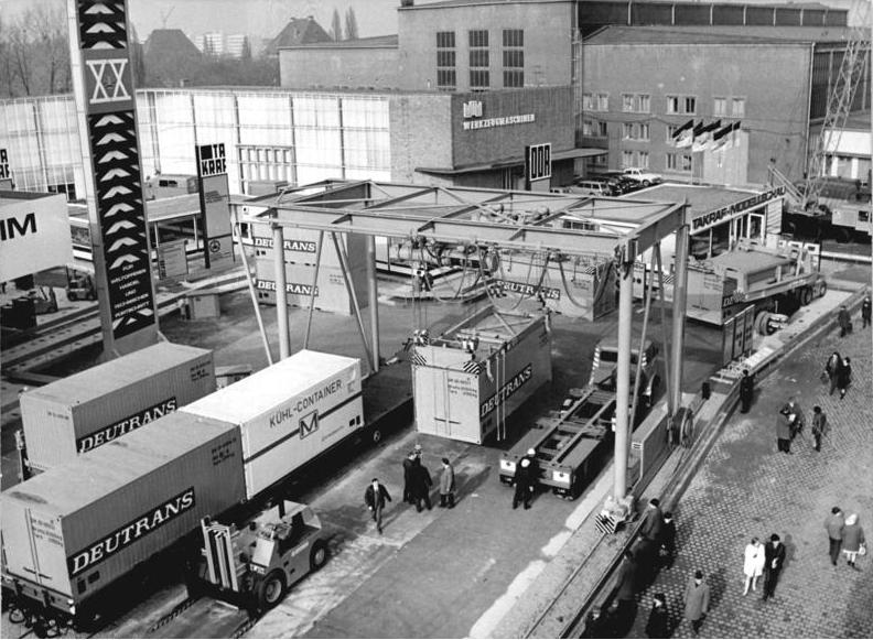 Leipzig, Frühjahrsmesse, Container-Umschlagsystem ZB-Ritter-3-3-69-Sche-Leipzig: Frühjahrsmesse 1969 - Auf dem Freigelände D V zeigt die VVB Takraf ein Container-Umschlagsystem mit Dieselgabelstaplern für Lasercontainer, Containerkrane, Speziel-LKWs und Spezialgüterwagen.